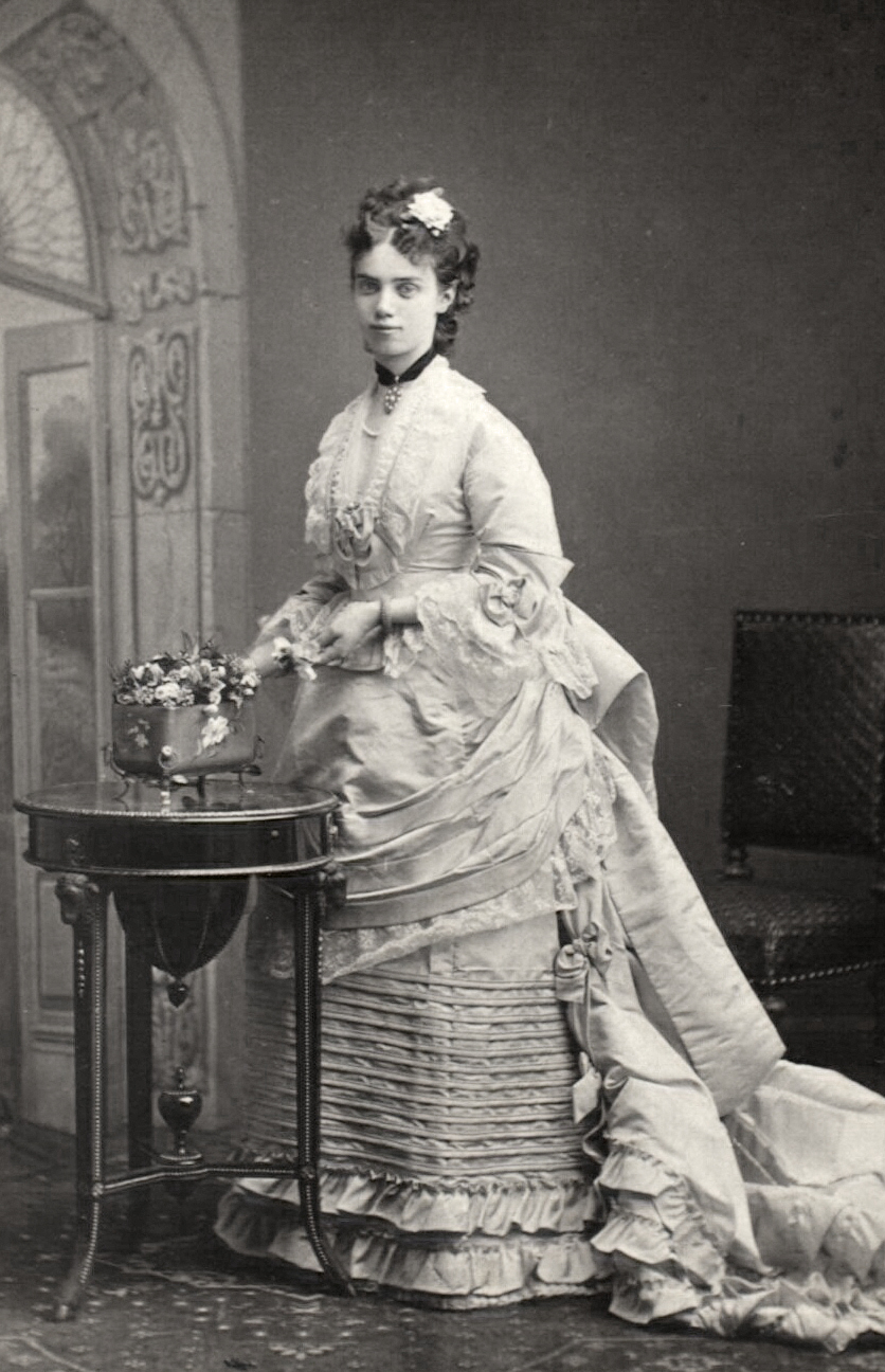 Thyra (29.09.1853-26.02.1933) prinsesse af Danmark, hertuginde af Cumberland